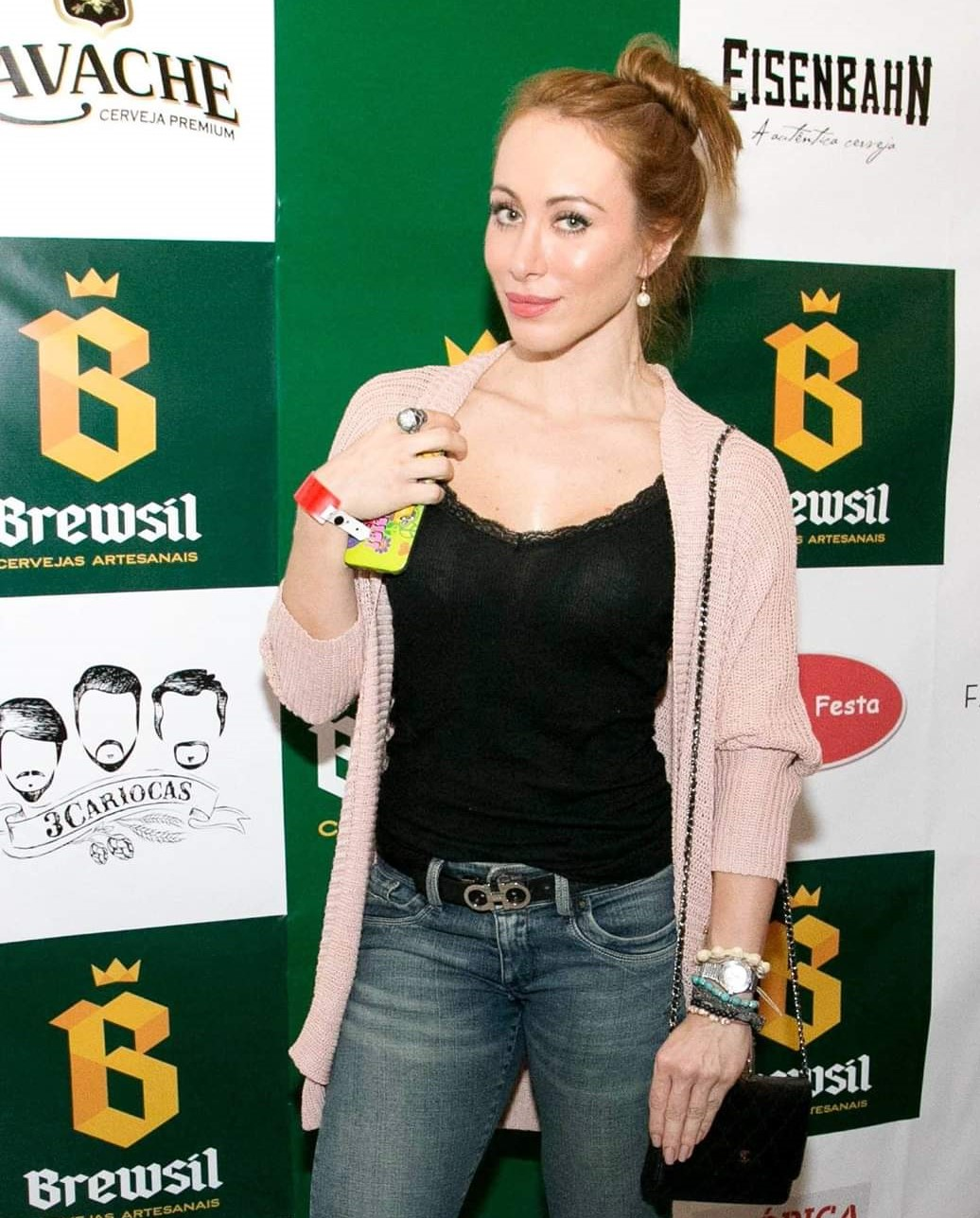 Aline em evento